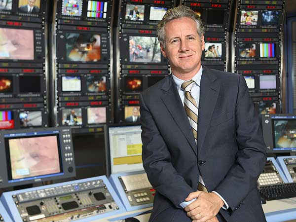 El periodista español Lorenzó Milá, en la mesa de control de informativos de TVE.